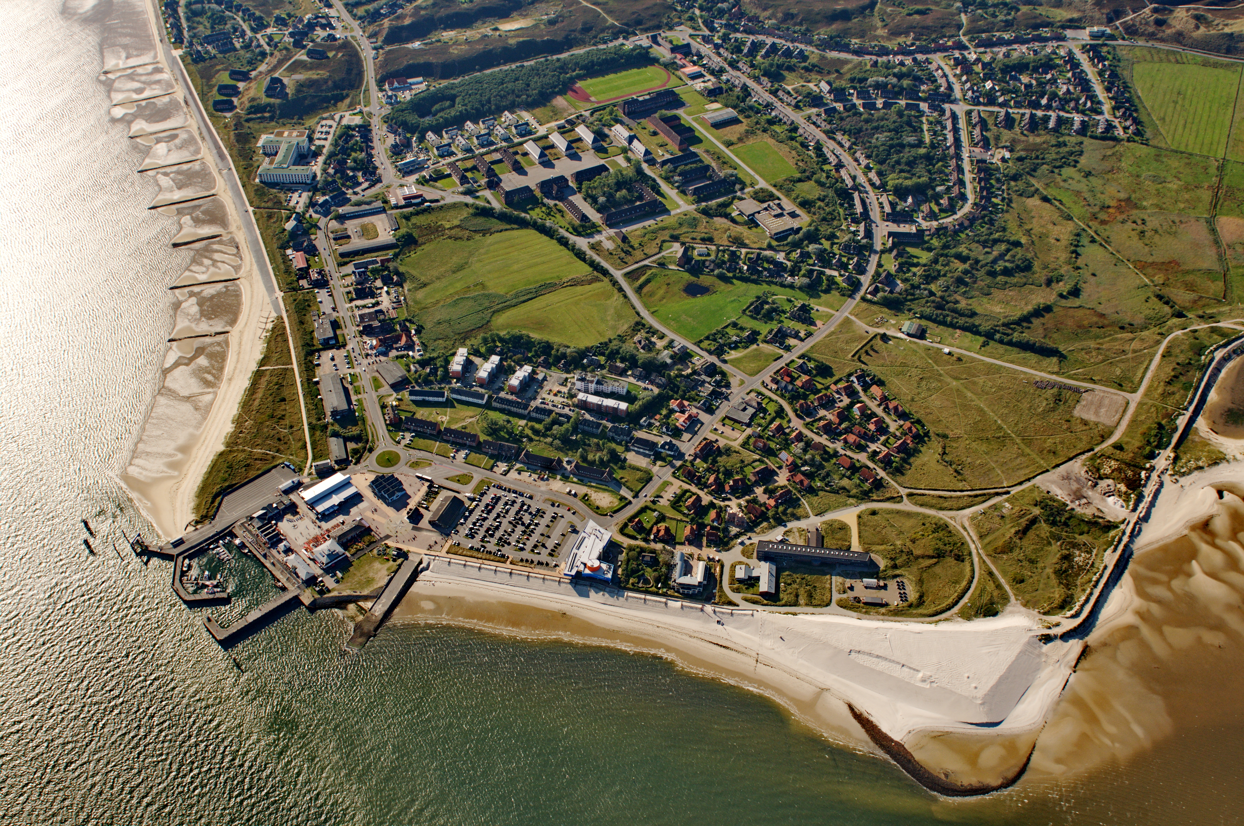 Fotoflug über das nordfriesische Wattenmeer List auf Sylt